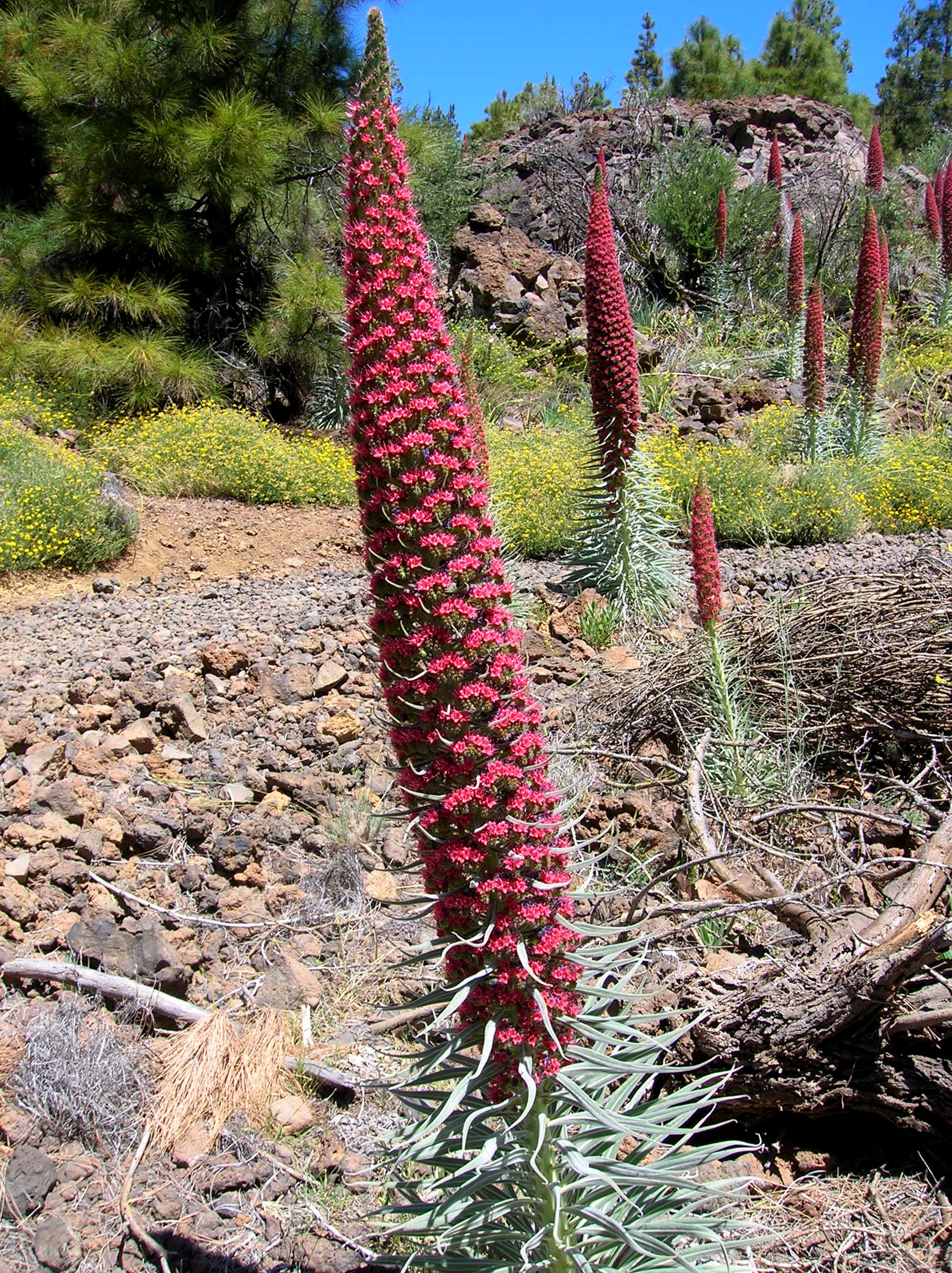 Echium wildpretii, Tenerife